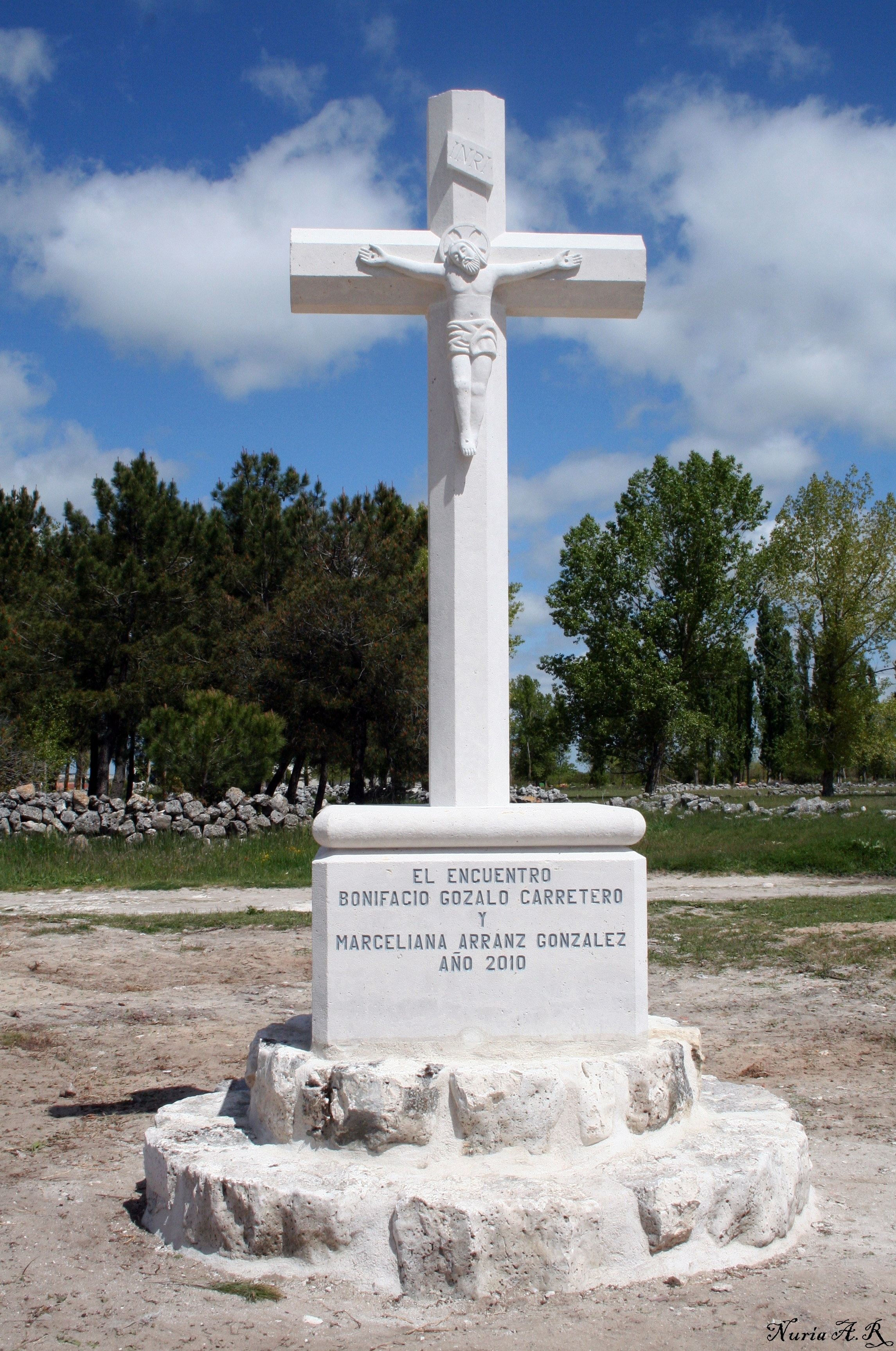 Cruz situada en el paraje del encuentro en Cozuelos de Fuentidueña